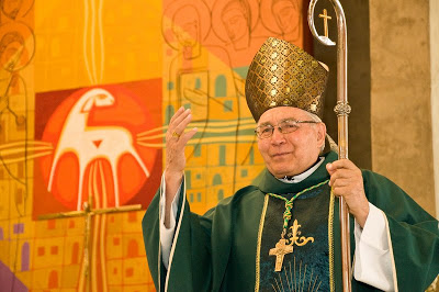 Bispo Emérito de Campo Limpo